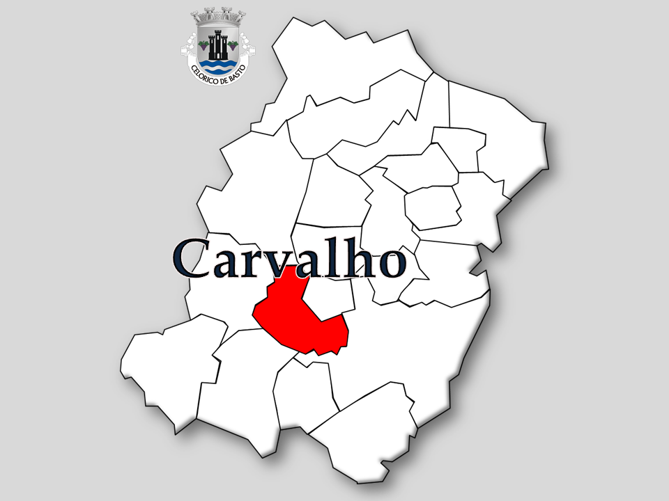 Censos 1864/2011